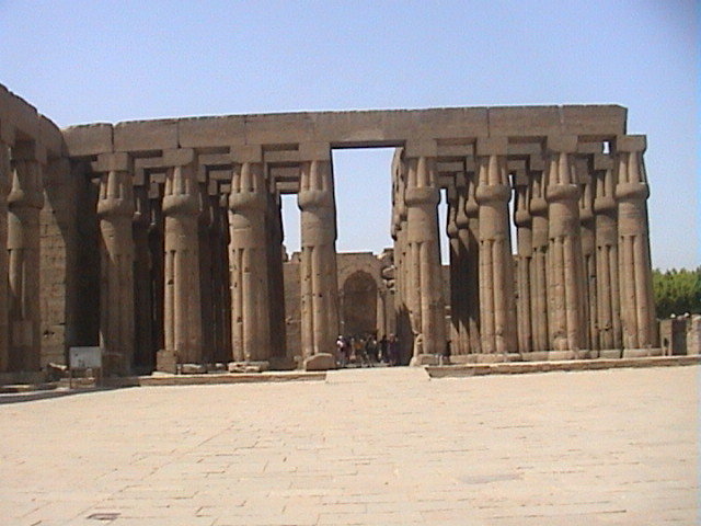 Grande cour solaire d'Aménophis III au temple de Louxor - XVIIIe dynastie - Nouvel Empire